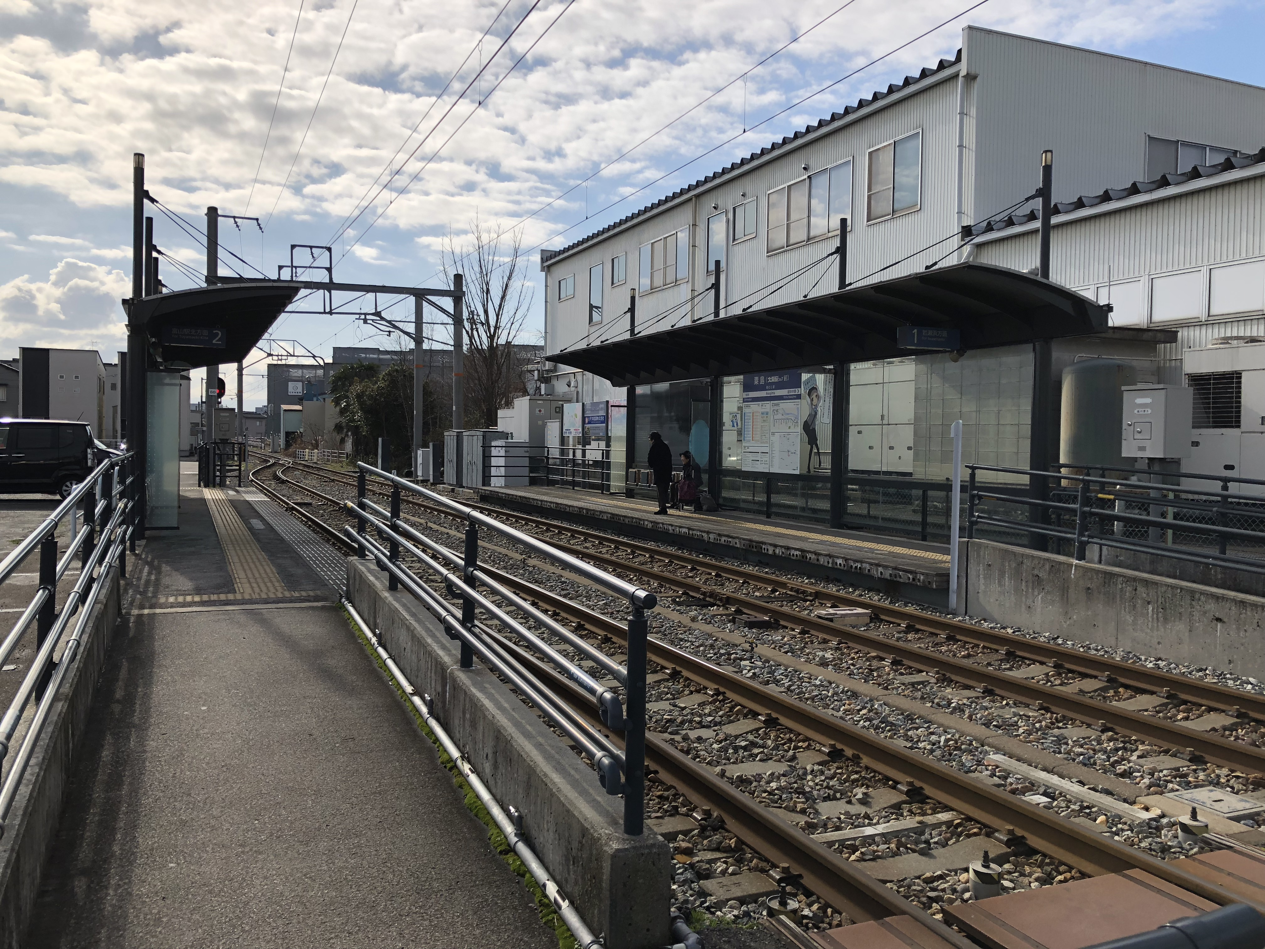 富山ライトレール富山港線粟島駅